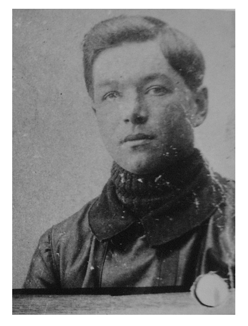 portrait de René Fonck pris en juin 1915